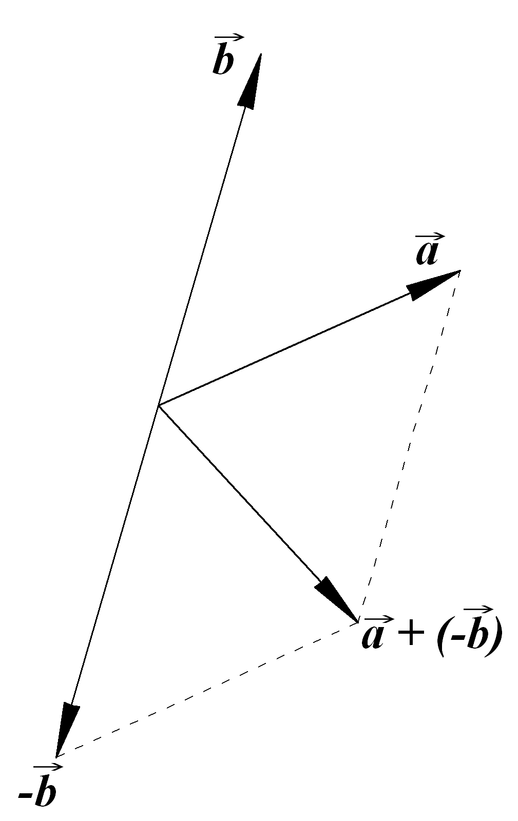 Аутор: User:Михајло Анђелковић